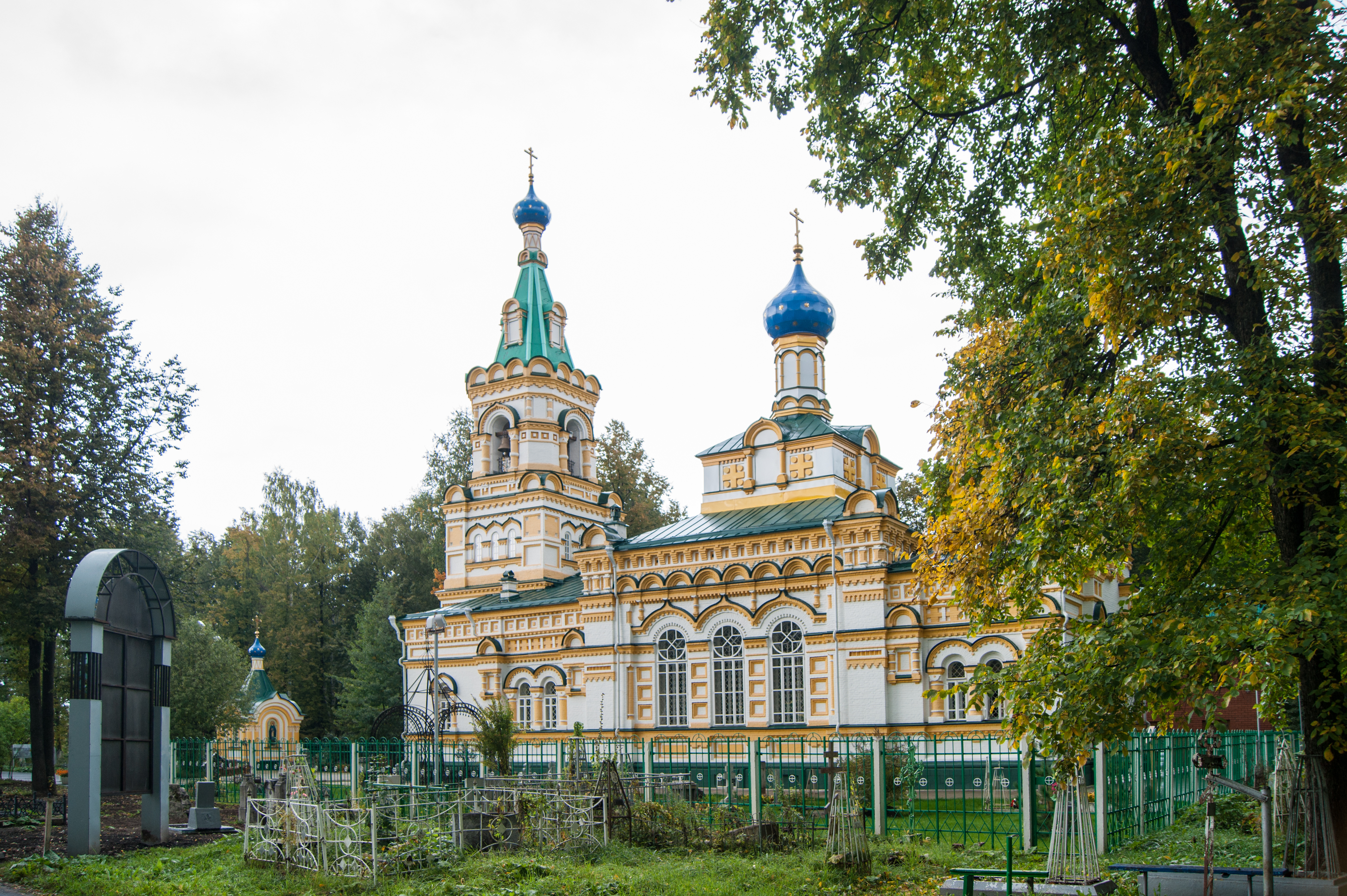 Церковь Успения Божией Матери: Тихая улица, 23, Егошихинское (старое) кладбище, Пермь, Пермский край